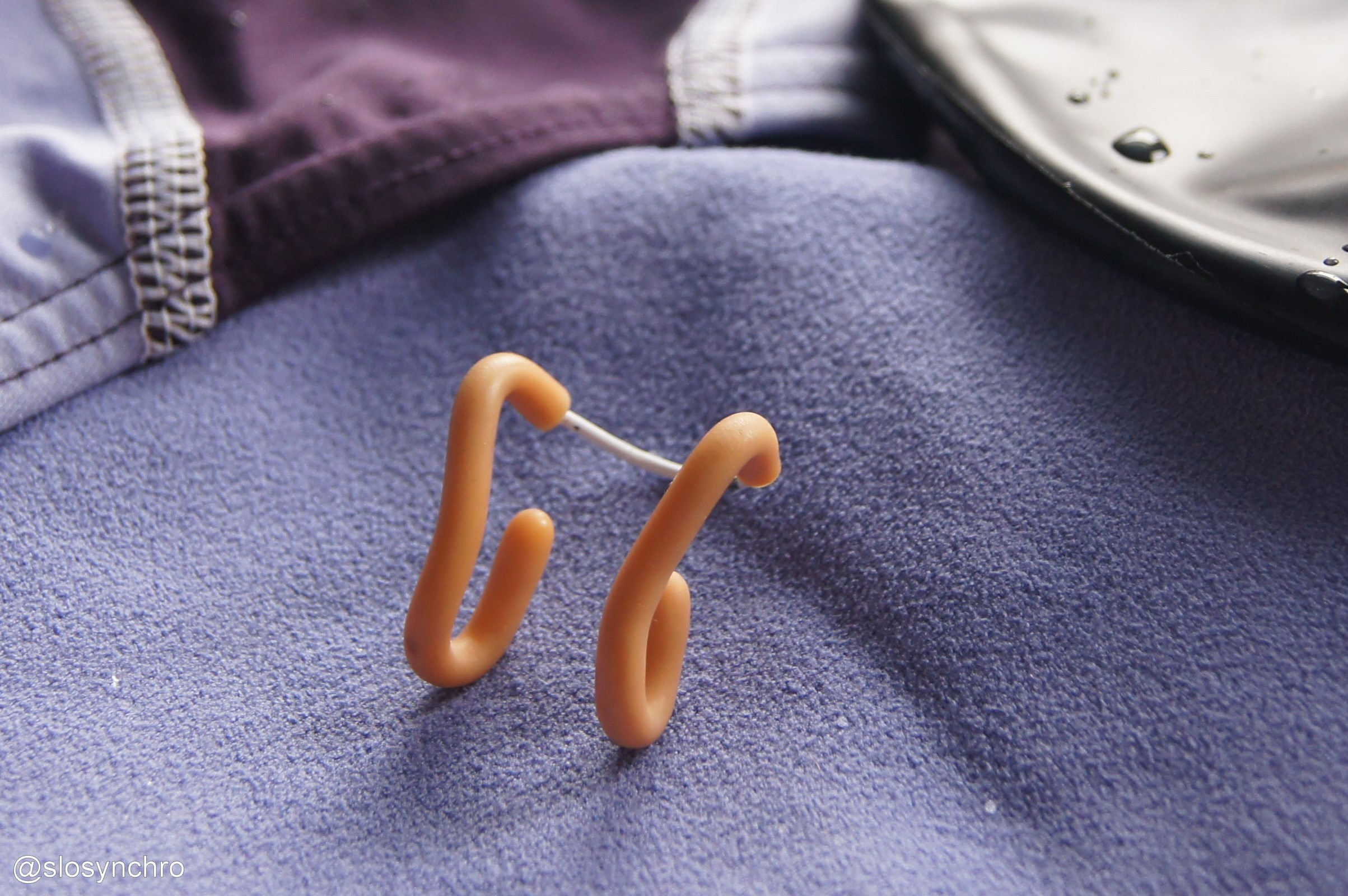 Ščipalka za nos